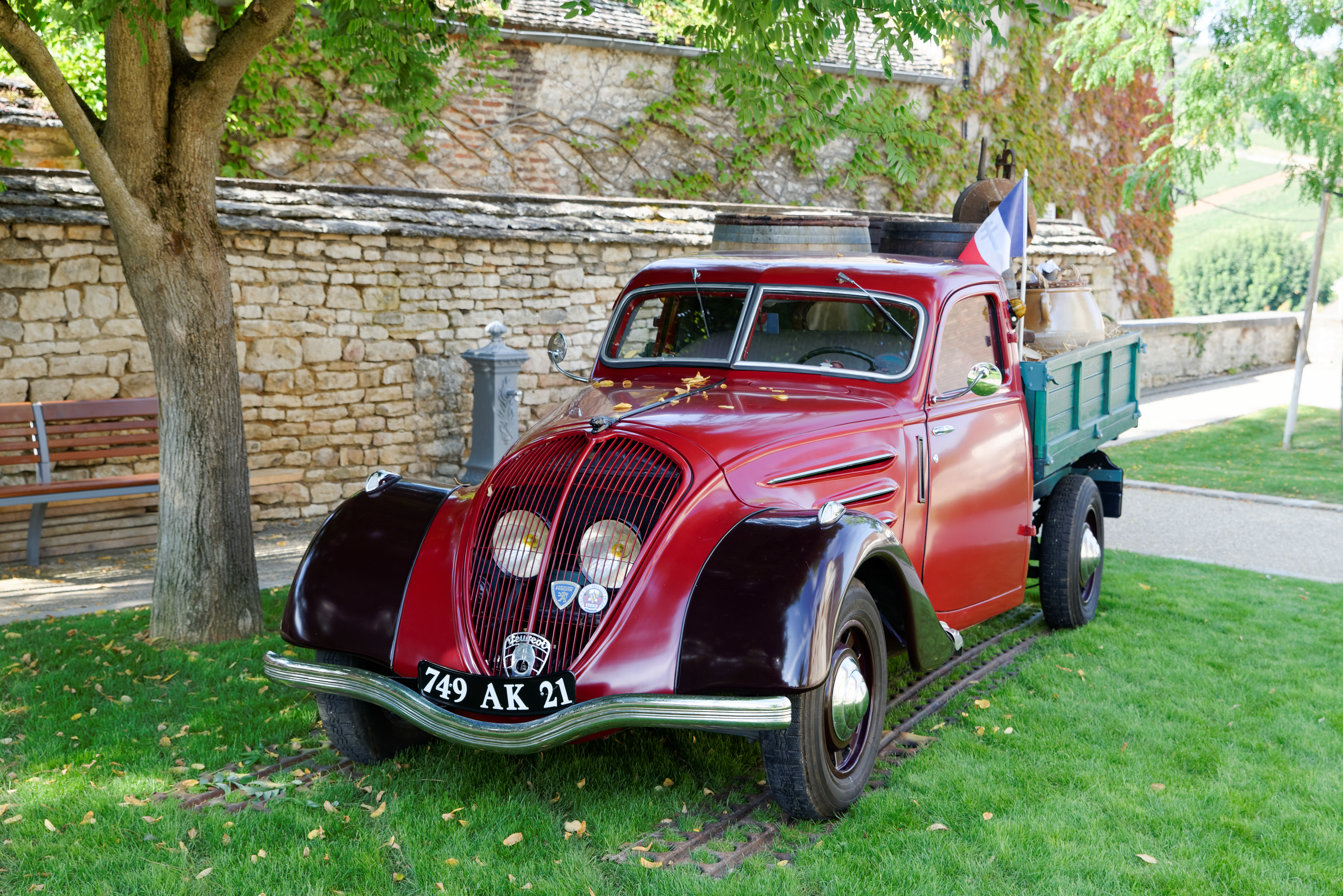 Exposition d'une camionnette Peugeot 402 devant l'hôtel de ville lors du 50e anniversaire du film La Grande Vadrouille à Meursault (Côte-d'Or, Bourgogne-Franche-Comté, France).